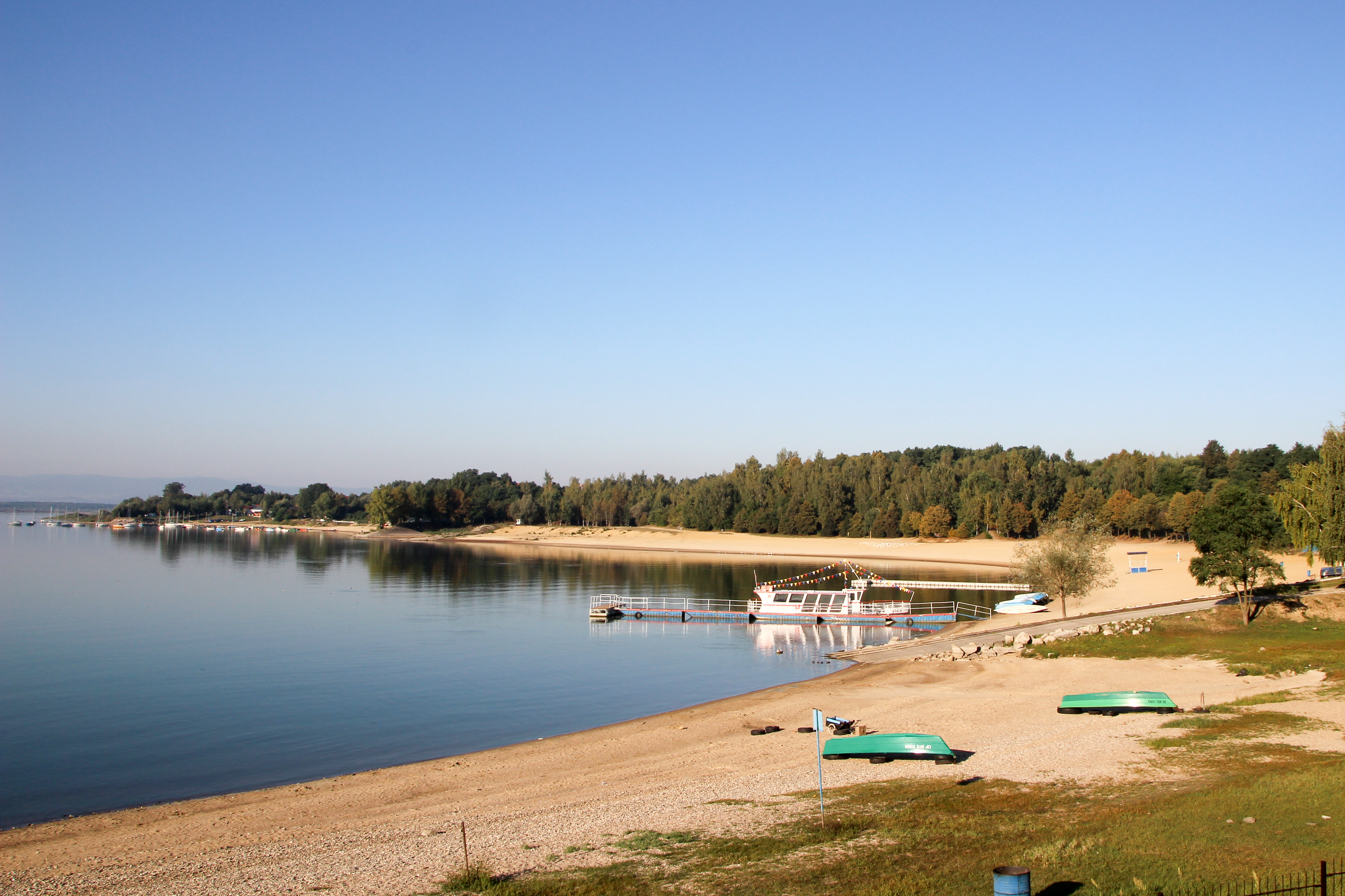 Skorochów – wieś w Polsce położona w województwie opolskim, w powiecie nyskim, w gminie Nysa.